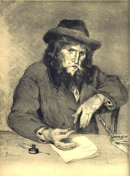 Portrait of French writer Léon Cladel (1834-1892) by Félix Bracquemond (1833-1914). Published in Judith Cladel, La Vie de Léon Cladel, suivie de Léon Cladel en Belgique, par Edmond Picard, A. Lemerre, Paris, 1905.